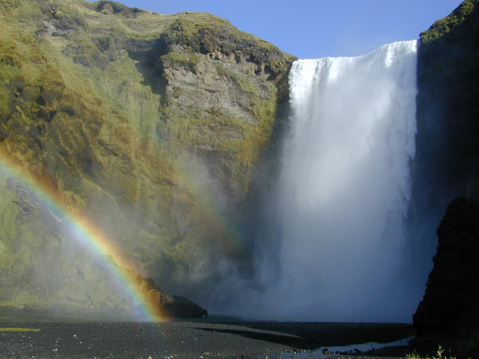 Skógafoss mit Regenbogen